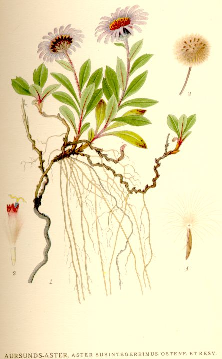 Aster subintegerrimus (syn. Eurybia sibirica)